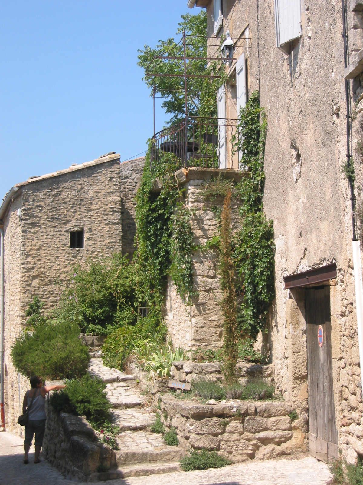 Bonnieux, Vaucluse, Luberon, France Photo prise le 26 juillet 2006 Aut : Jddmano